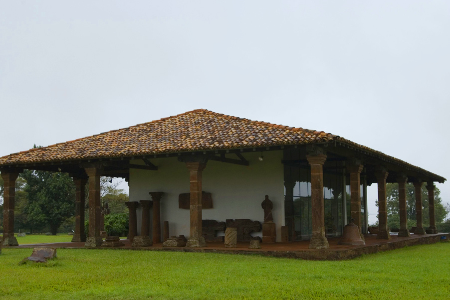 Endereço: Rua São Nicolau, S/Nº – São Miguel das Missões – RS. Tel: (55) 3381-1291 Horários: Todos os dias, das 9h às 12h e das 14h às 18h * Durante o horário de verão, o museu fica aberto até as 20h Foto: Divulgação IBRAM